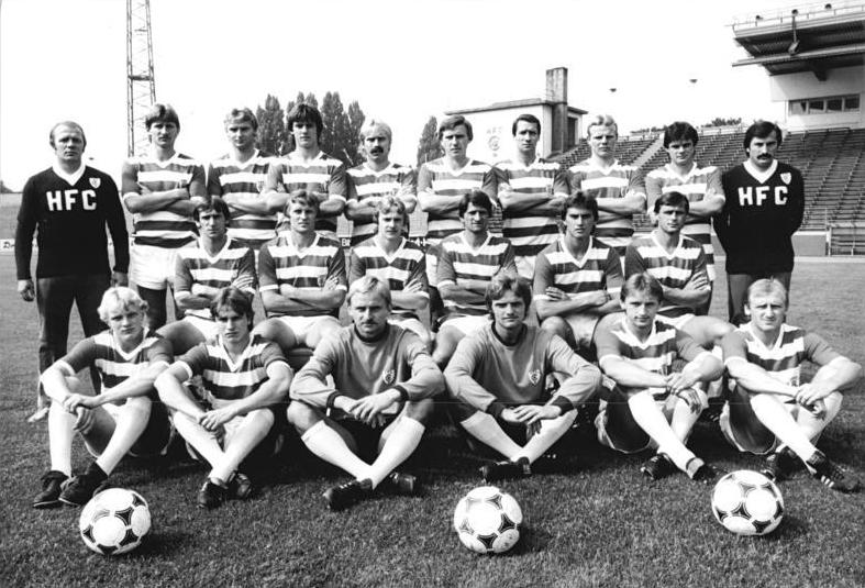 ADN-ZB-Lehmann-23.8.83-zin-Halle: Die Mannschaft des HFC Chemie für die Fußball-Oberligasaison 1983-84. Vorn v.l.n.r.: Jens Helling, Lutz Radtke, Torhüter Frank Jaenecke, Torhüter Michael Walther, Uwe Lorenz und Holger Krostitz. Mitte v.l.n.r.: Roland Wawrzyniak, Dieter Strozniak, Jens Henschel, Werner Peter, Frank Pastor und Lothar Kurbjuweit. Stehend v.l.n.r.: Klaus Urbanczyk, verantwortlicher Oberligatrainer, Nobert Schübbe, Gerald Wagner, Andreas Wagenhaus, Jürgen Schliebe, Manfred Fülle, Mannschaftskapitän Hartmut Meinert, Michael Rehschuh, Wolfgang Schmidt und Trainer Wolfgang Kleinschmager.